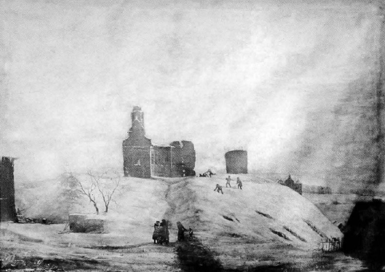 Беларуская (тарашкевіца): Наваградак (Navahradak), вуліца Замкавая (vulica Zamkavaja). Замак узімку